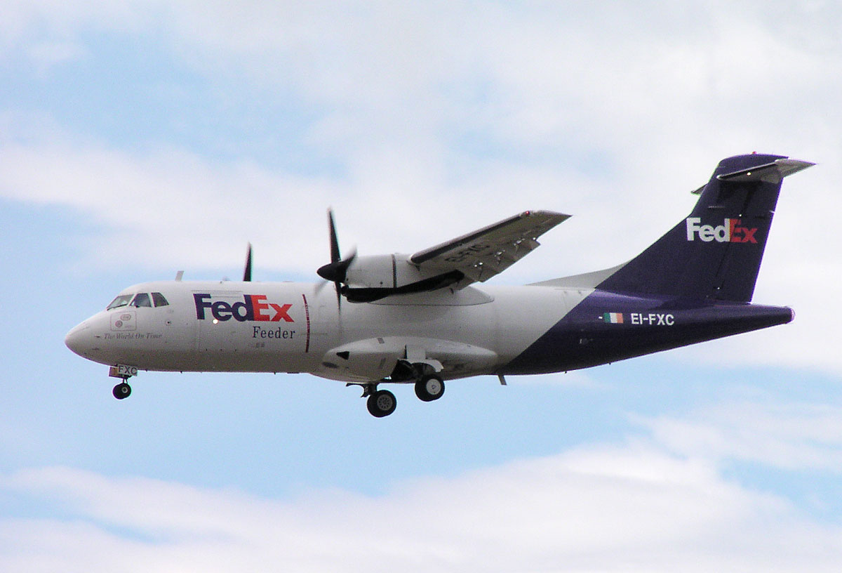 Federal Express ATR 42-300F (EI-FXC) in Frankfurt (EDDF)